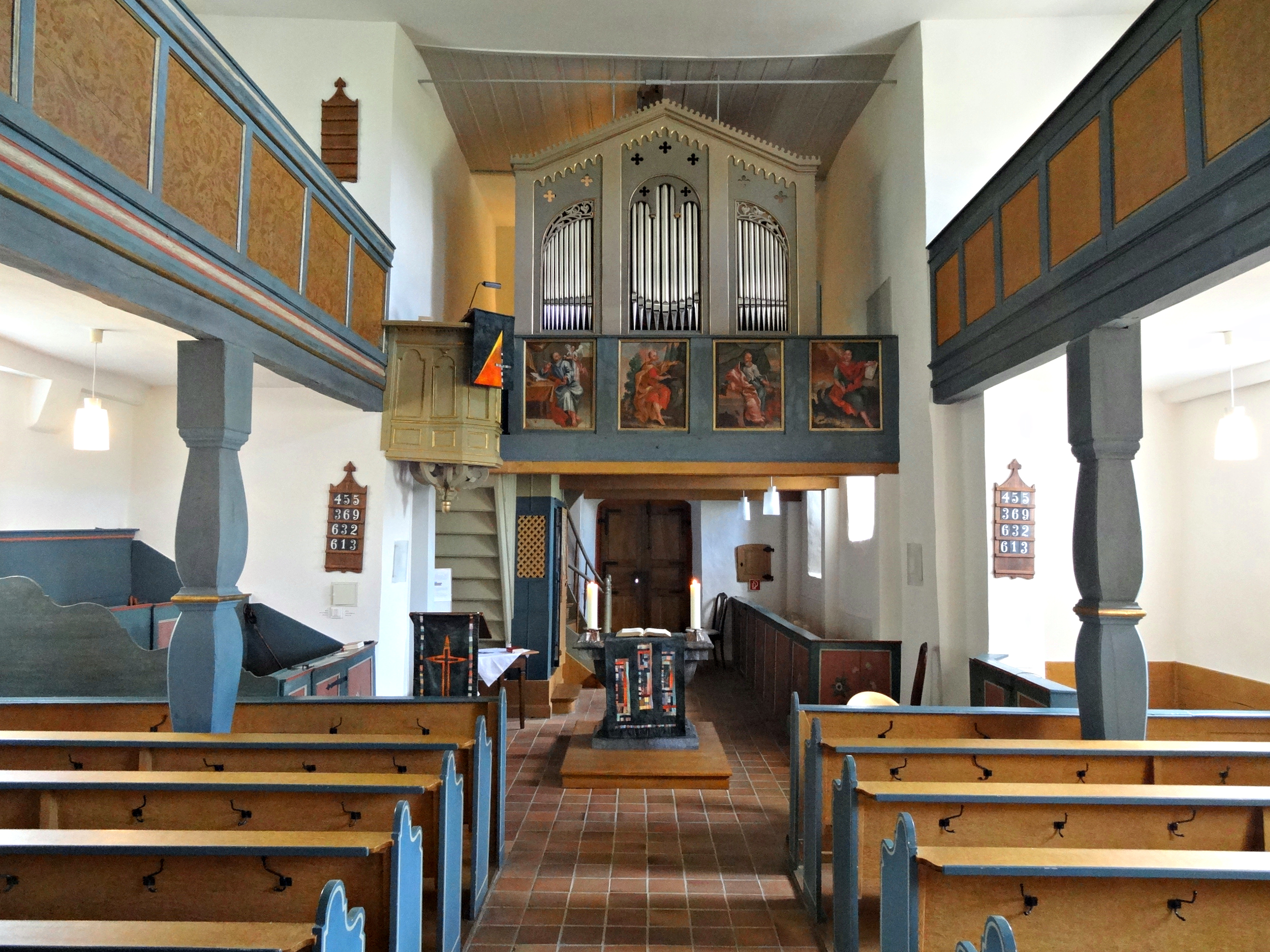 Evangelische Kirche Nonnenroth (Hungen)